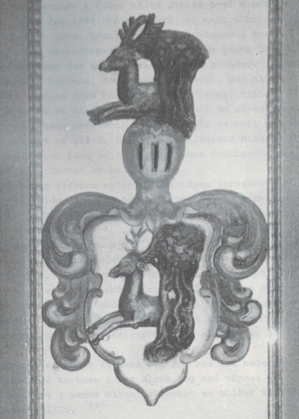 Landsdommer Nicolaus Nissens våben på prædikestolen i Hover Kirke